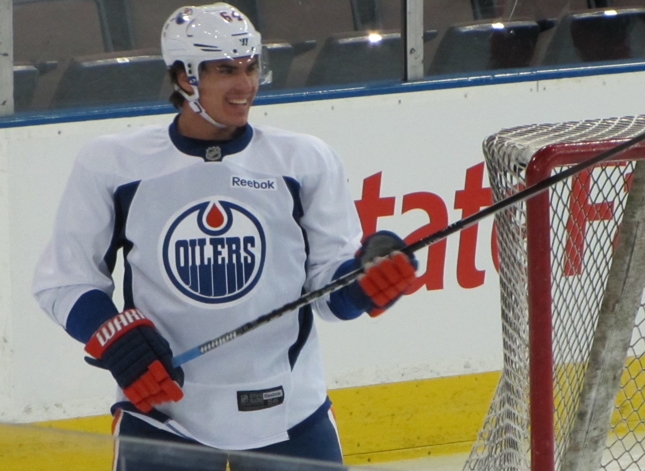 Nail Yakupov